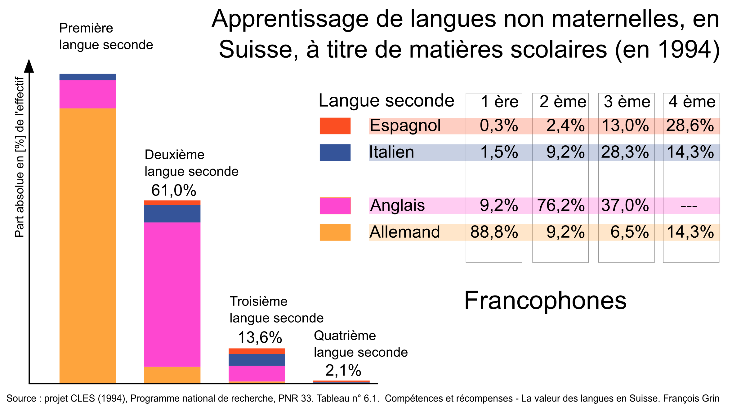 Apprentissage de langues non maternelles, en Suisse, à titre de matières scolaires (en 1994). Pour les francophones. Graphique réalisé sur la base du tableau n° 6.1, p. 107 du livre Compétences et récompenses - La valeur des langues en Suisse de François Grin, Éditions universitaires Fribourg, Suisse, 1999 (ISBN 2-8271-0843-7)